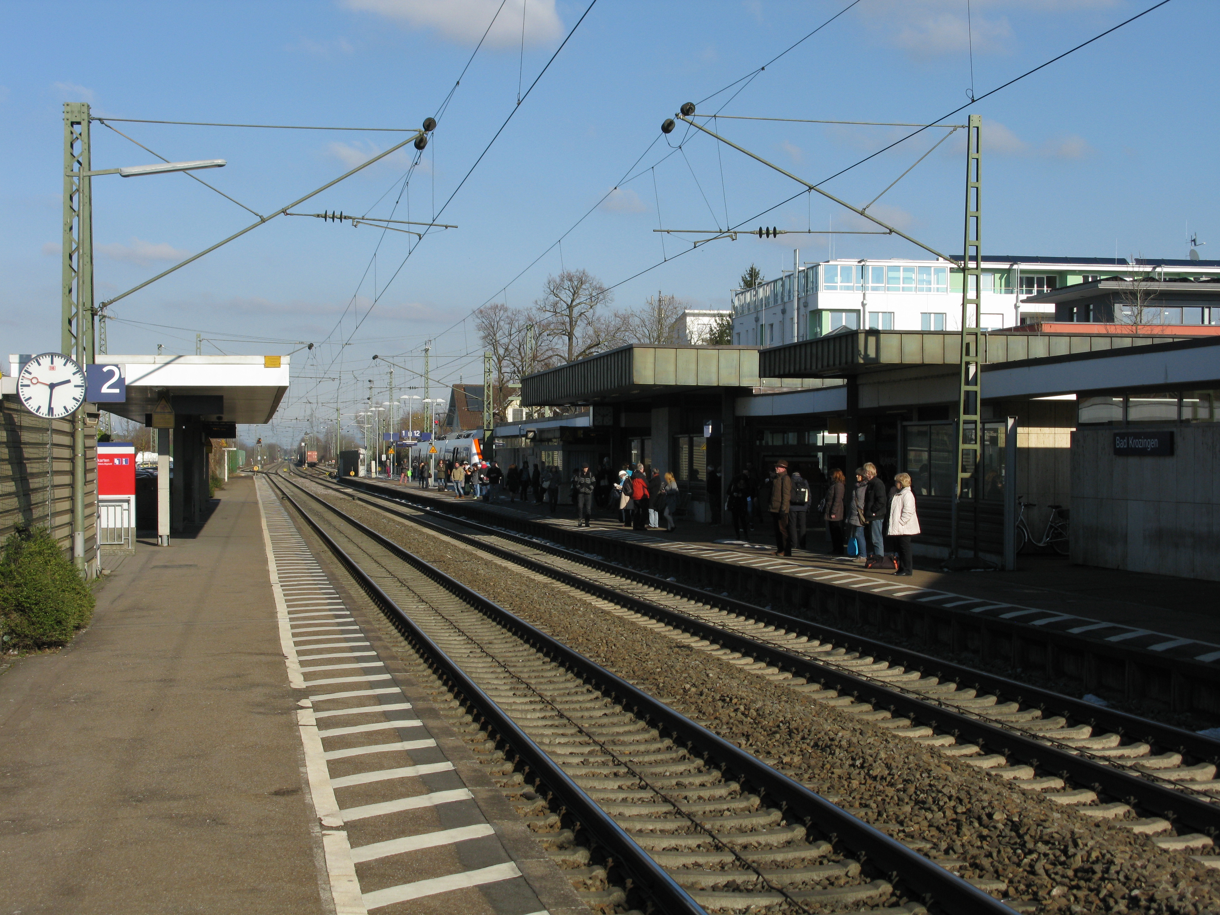 Bahnhof von Bad Krozingen, Blick nach Norden Richtung Freiburg